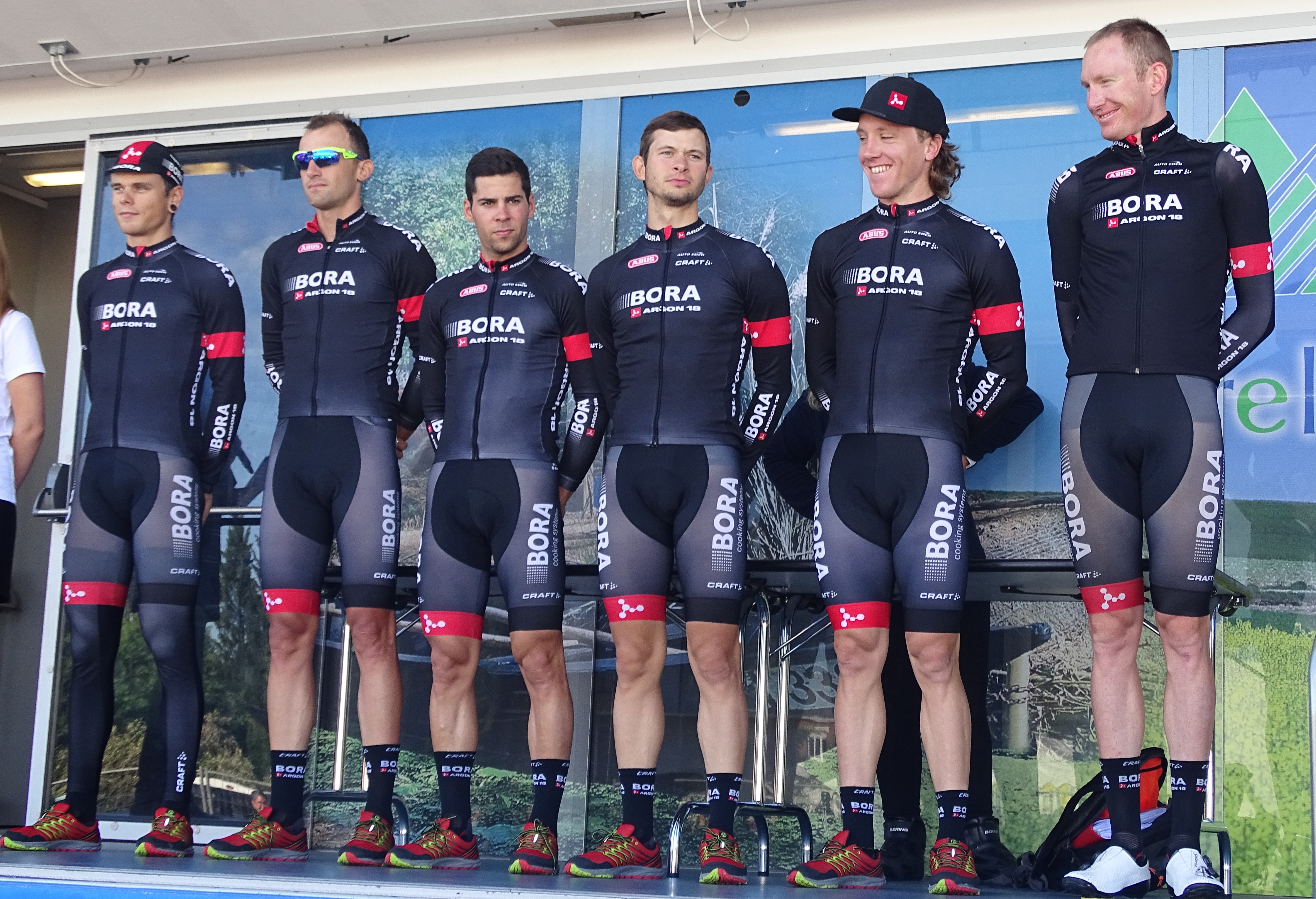 Reportage réalisé le dimanche 20 septembre à l'occasion du départ et de l'arrivée du Grand Prix d'Isbergues 2015 à Isbergues, Nord-Pas-de-Calais, France.